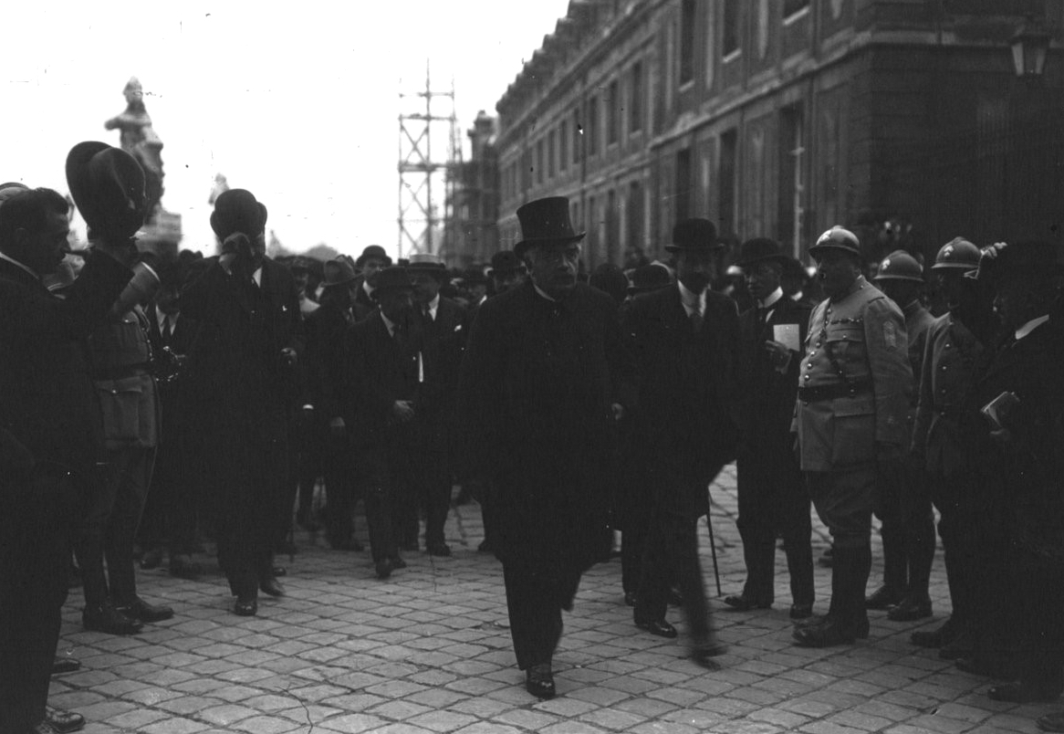 Alexandre Millerand arrivant à Versailles en vue de l'élection présidentielle de septembre 1920.